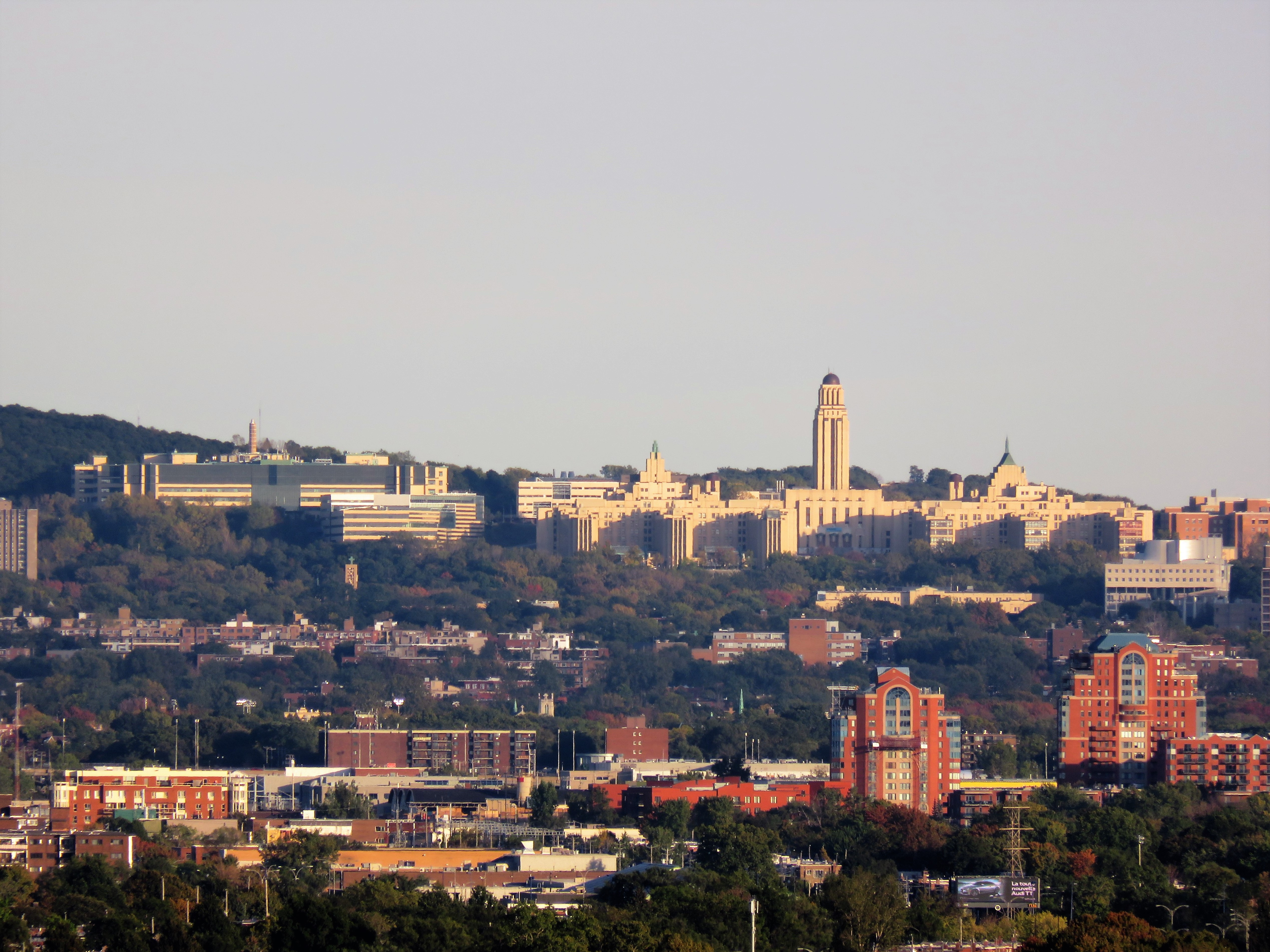 École polytechnique de Montréal et Pavillon Roger-Gaudry de l'Université de Montréal.